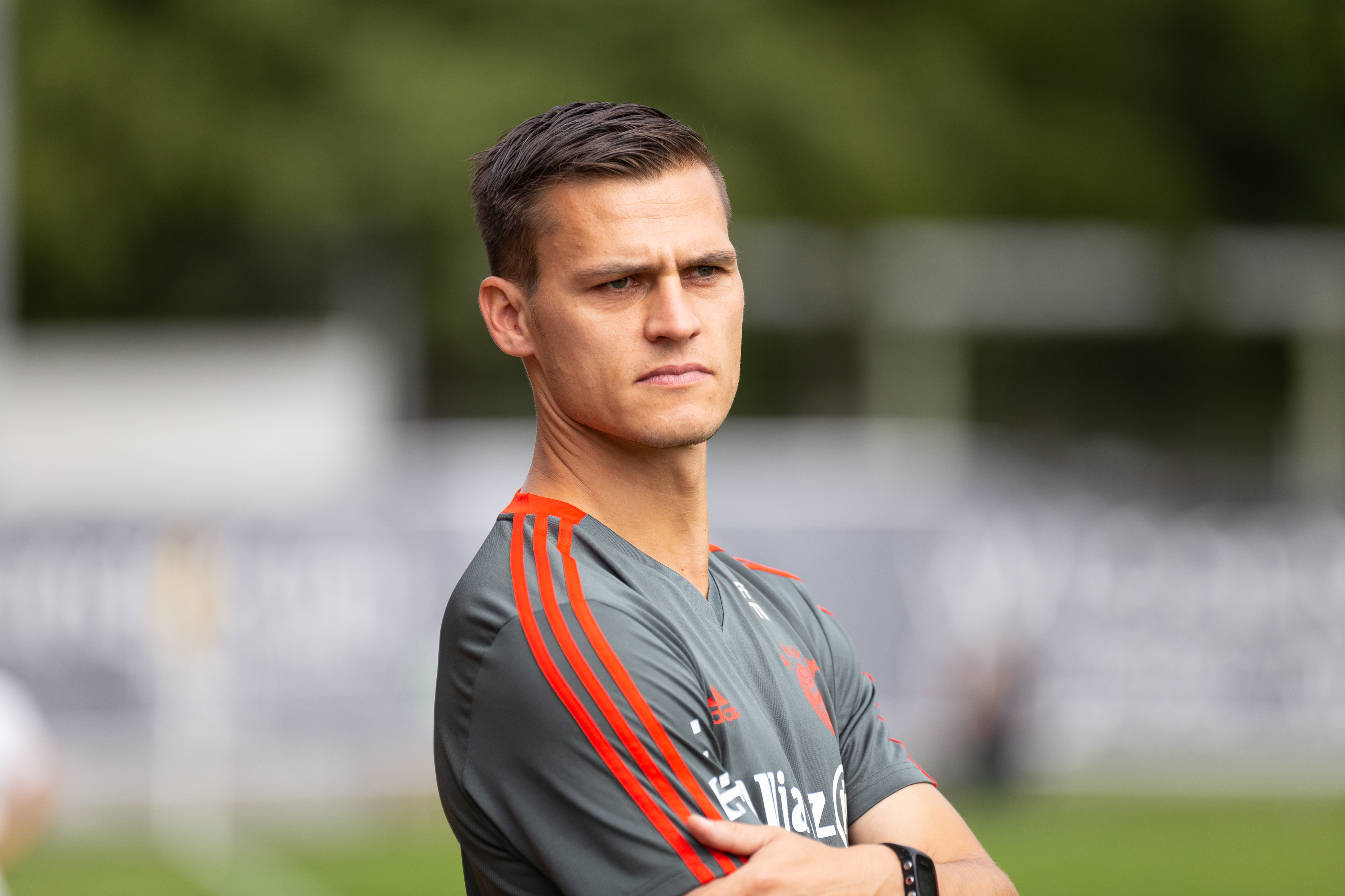 Fußball, DFB-Pokal Frauen, FF USV Jena - FC Bayern München; Thomas Wörle (FC Bayern München, Trainer, head coach); Porträt, Einzelbild an der Seitenlinie